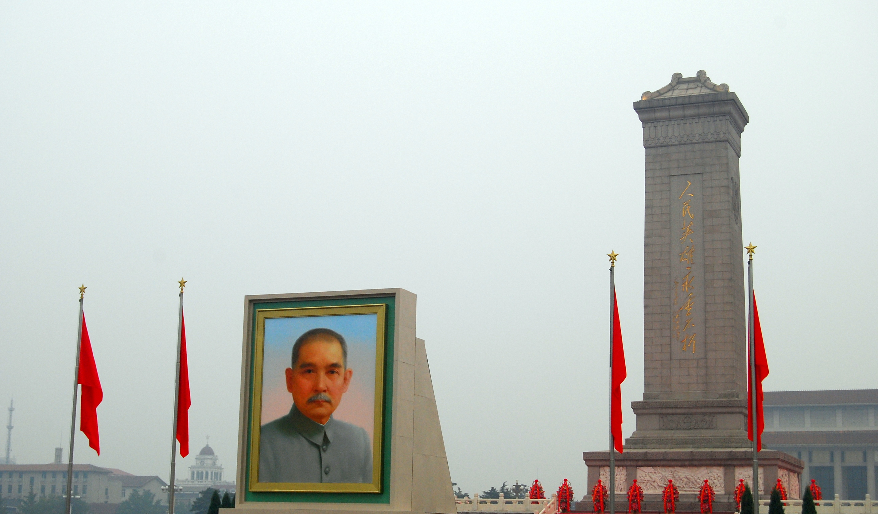 中文（中国大陆）: 孙中山与人民英雄纪念碑